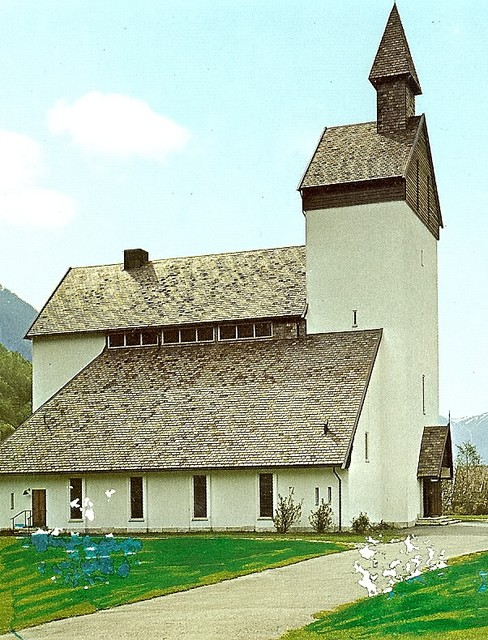 Høyanger kirke